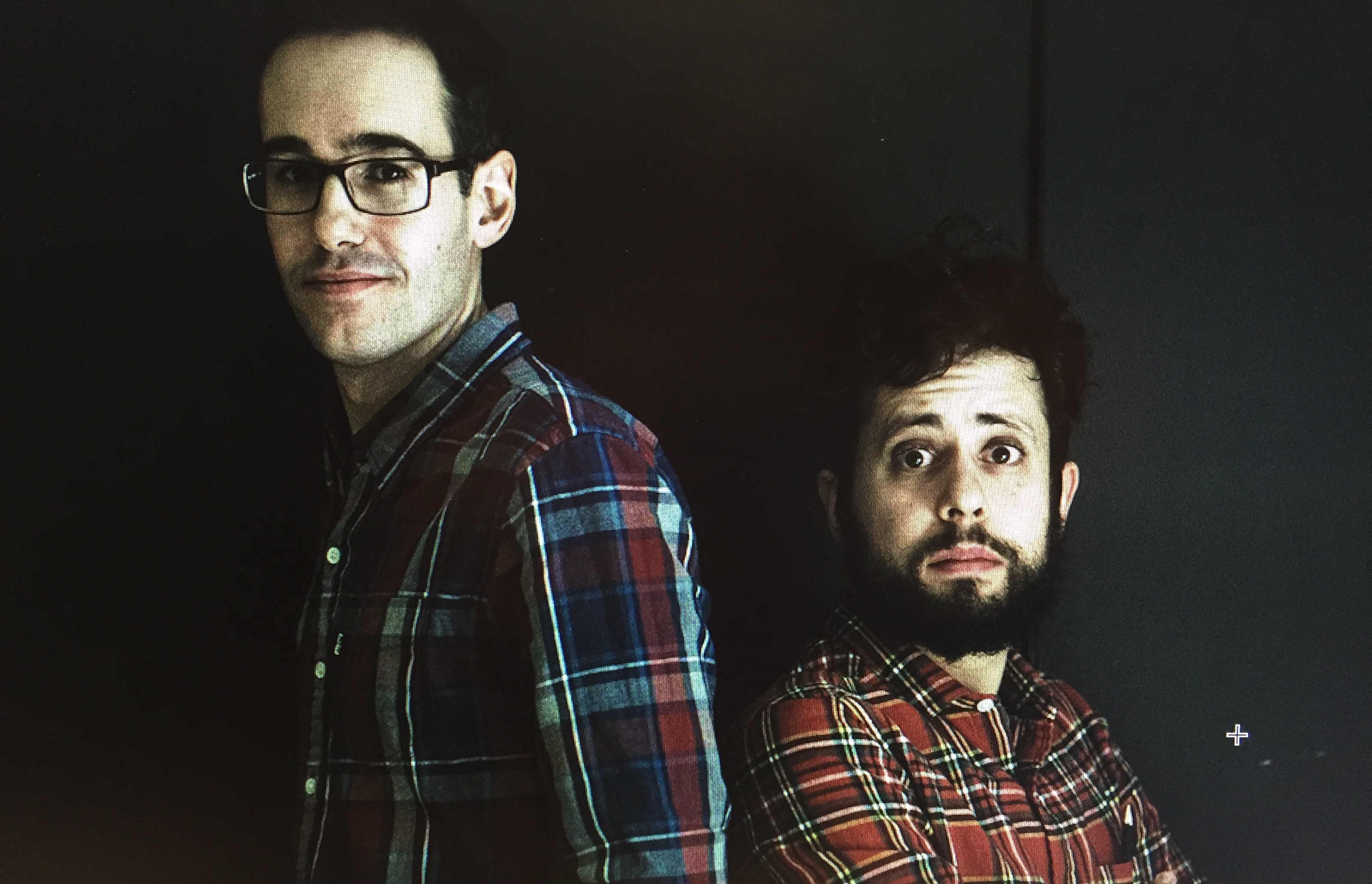 Los creadores de El Mundo Today, Xavi Puig y Kike García.